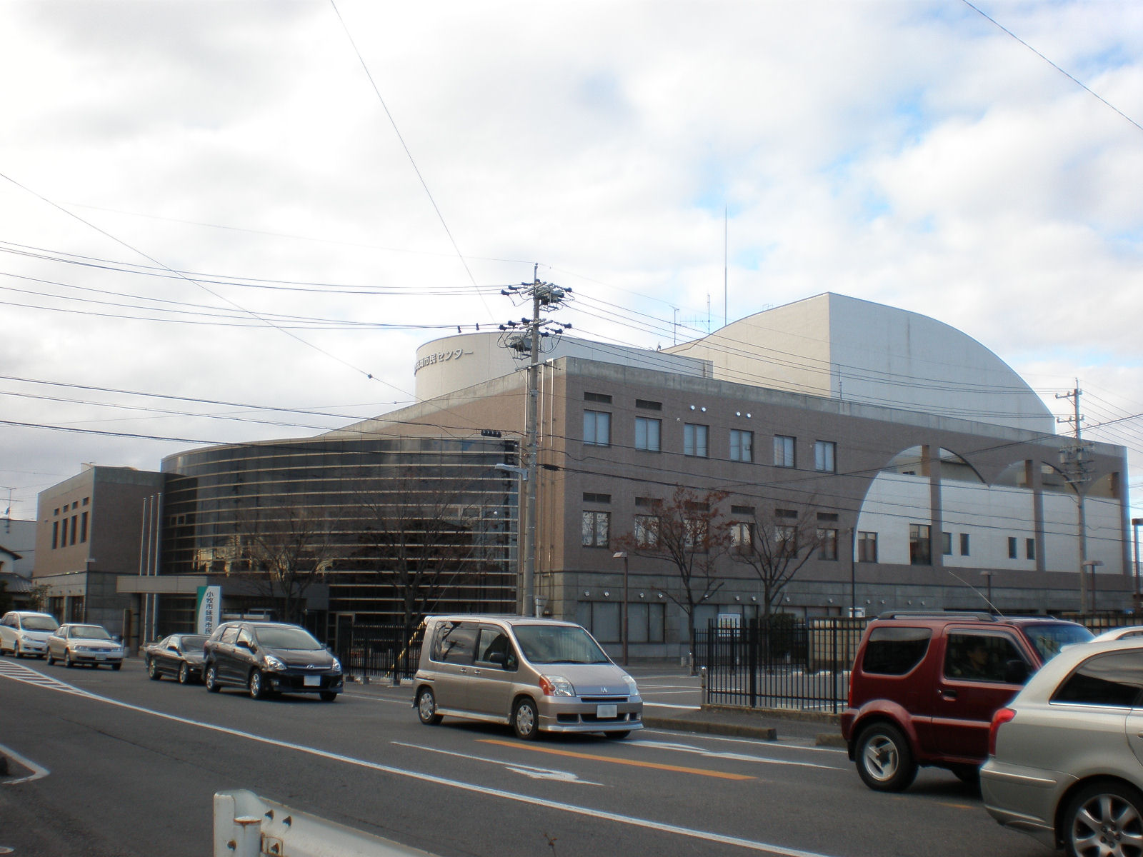 愛知県小牧市にある味岡市民センター